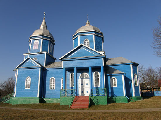 Покровська_церква_у_Монастирищі_на_Черкащині.jpg: Покровська церква у м. Монастирищі (райцентр Черкаської області), листопад 2009 року